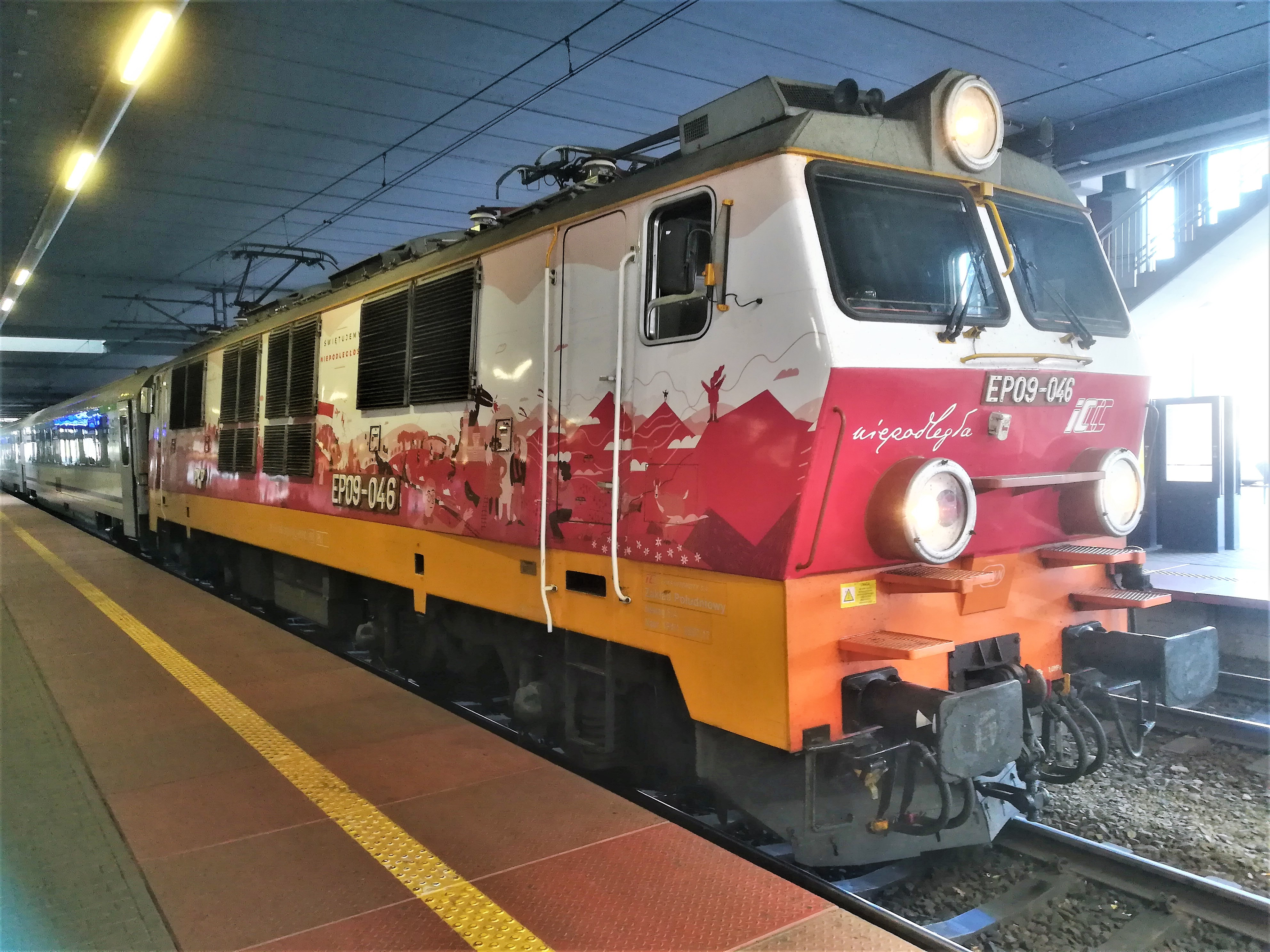 EP09-046 w barwach "Niepodległej" na stacji Poznań Gł.